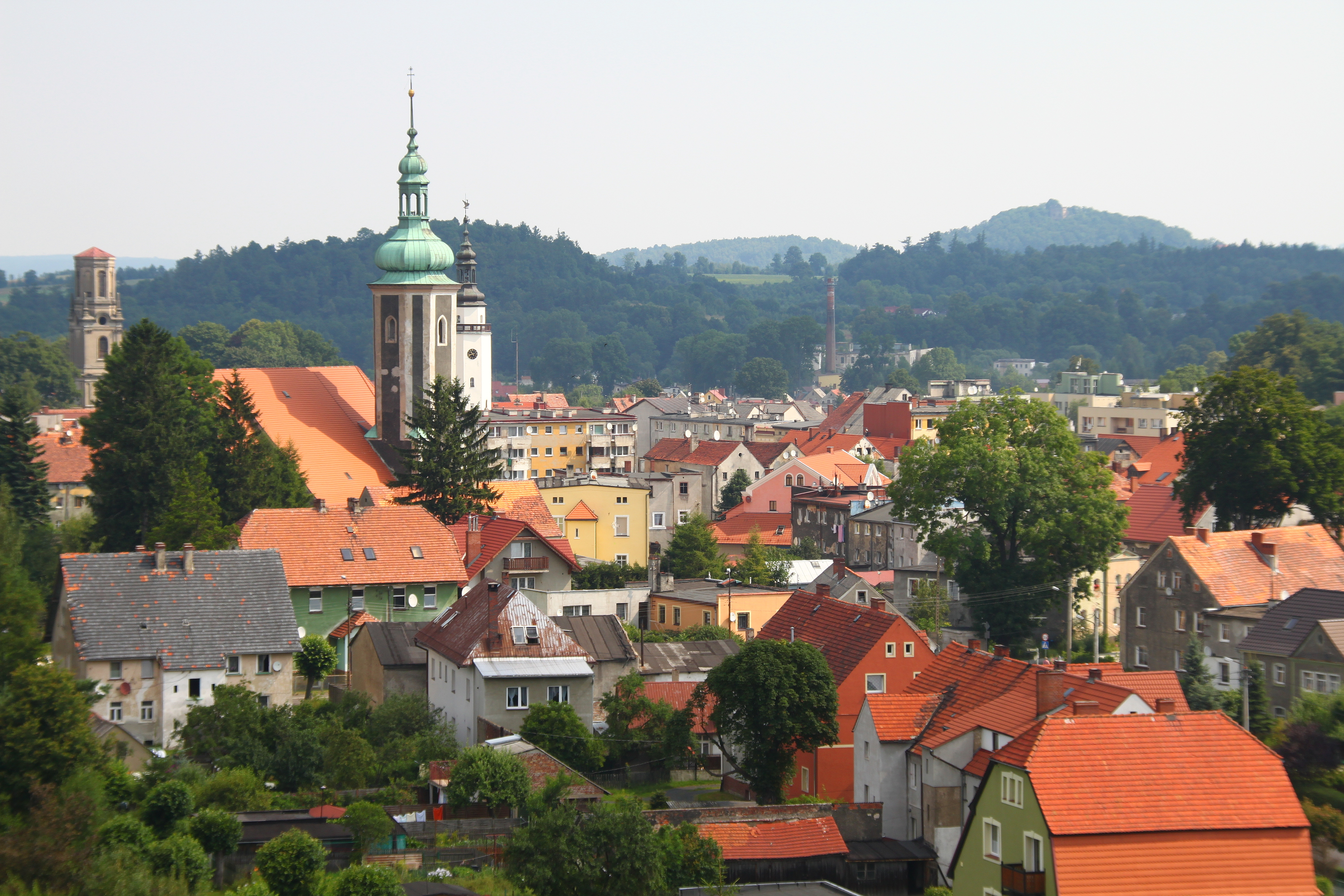 Mirsk, miasto, 1337, XVIII